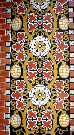 Ornamentik in Anlehnung an die Form der sog. Luther-Rose an der ev. Auenkirche in Berlin-Wilmersdorf